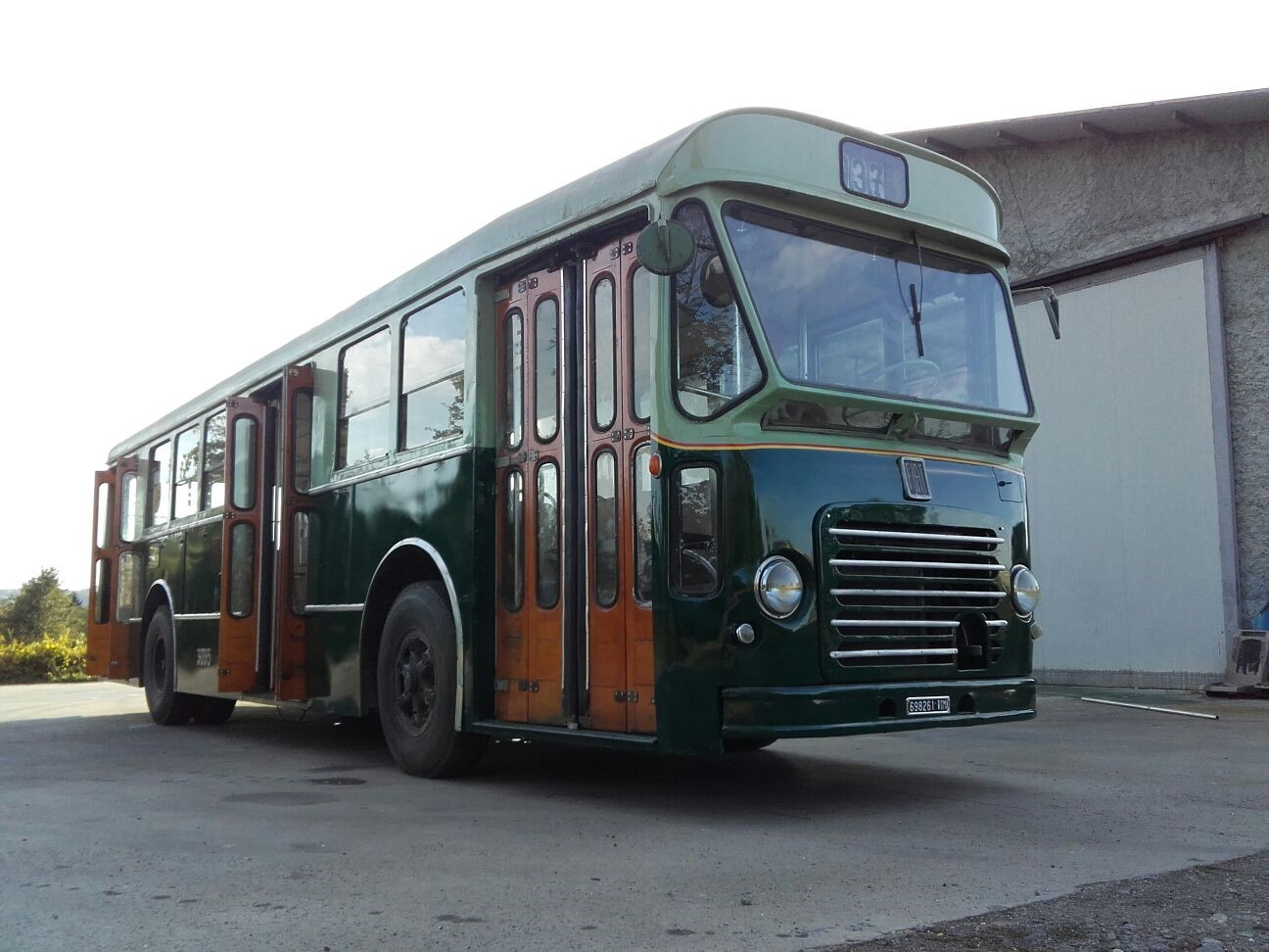 Autobus modello Fiat 410 Cansa ST4 del 1963 proveniente dall'Atac di Roma